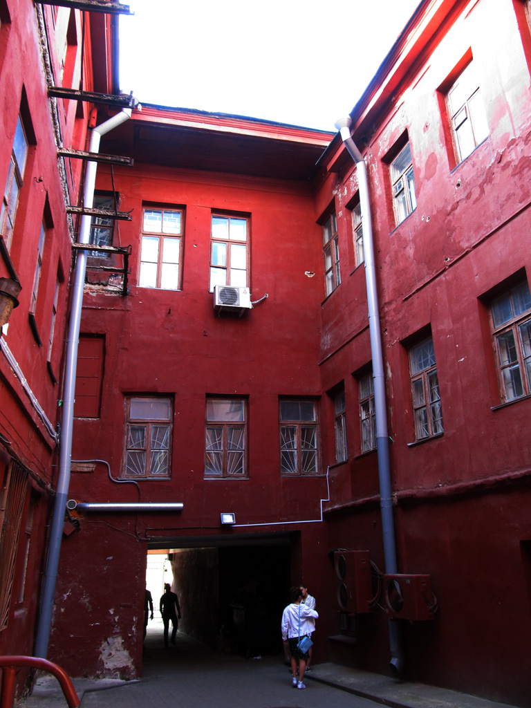 Мінск. Вуліца Камсамольская, 11 / Вуліца Рэвалюцыйная, 7